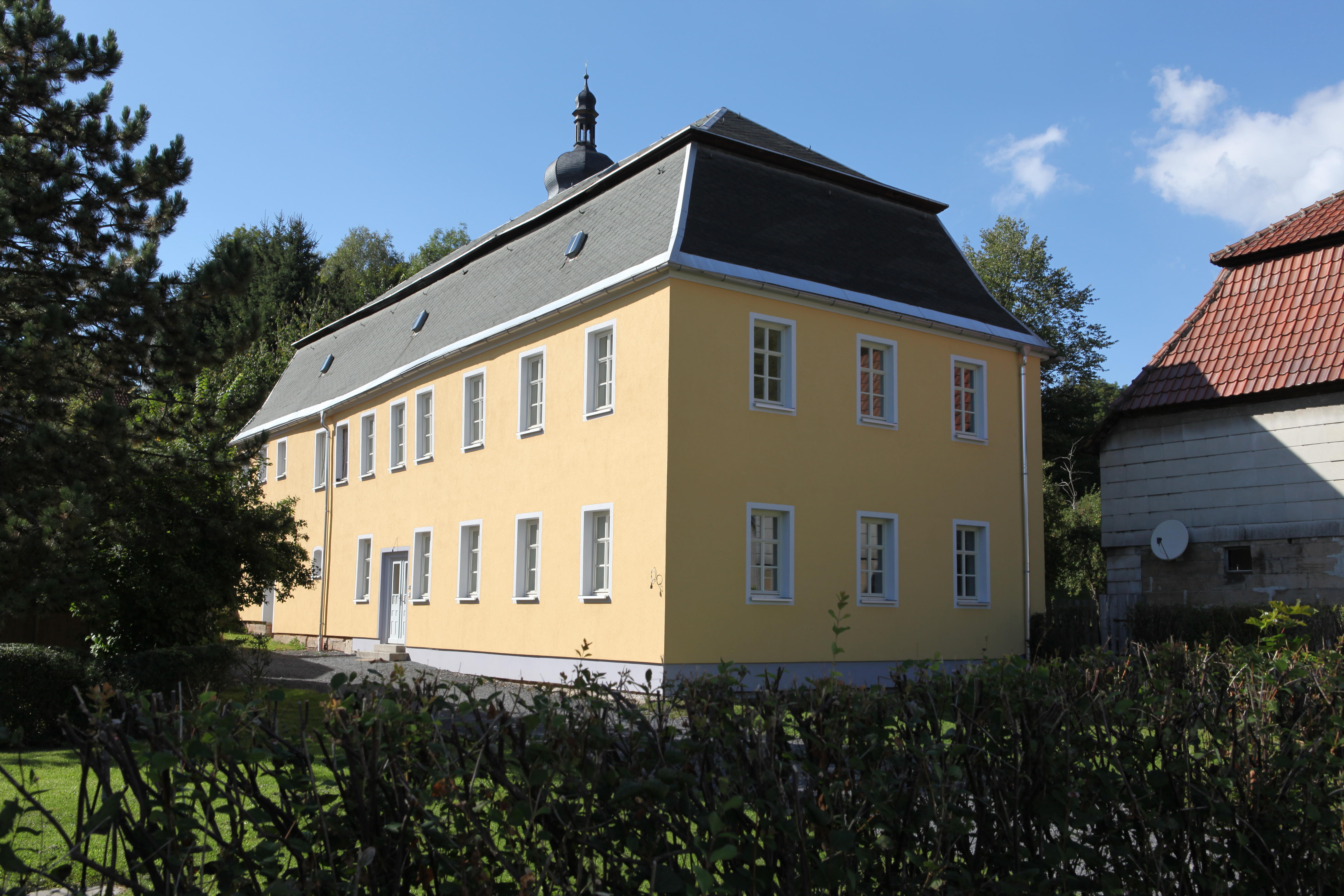 Pfarrhof, Tettaustraße 3 Heinersdorf, OT von Judenbach, Landkreis Sonneberg